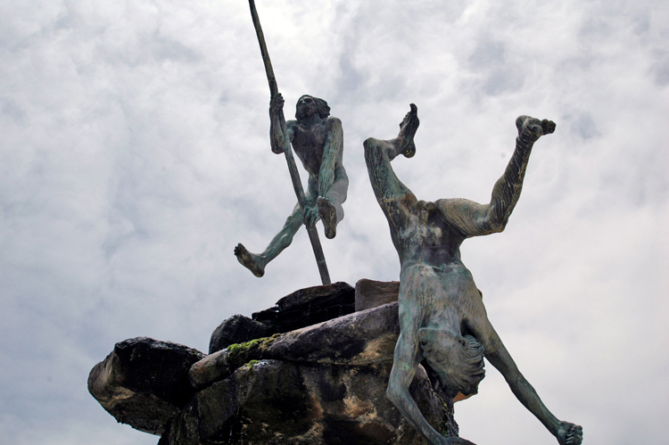 Escultura de Bentejuí y Tazarte saltando del roque de Ansite antes de ser apresados por los conquistadores.